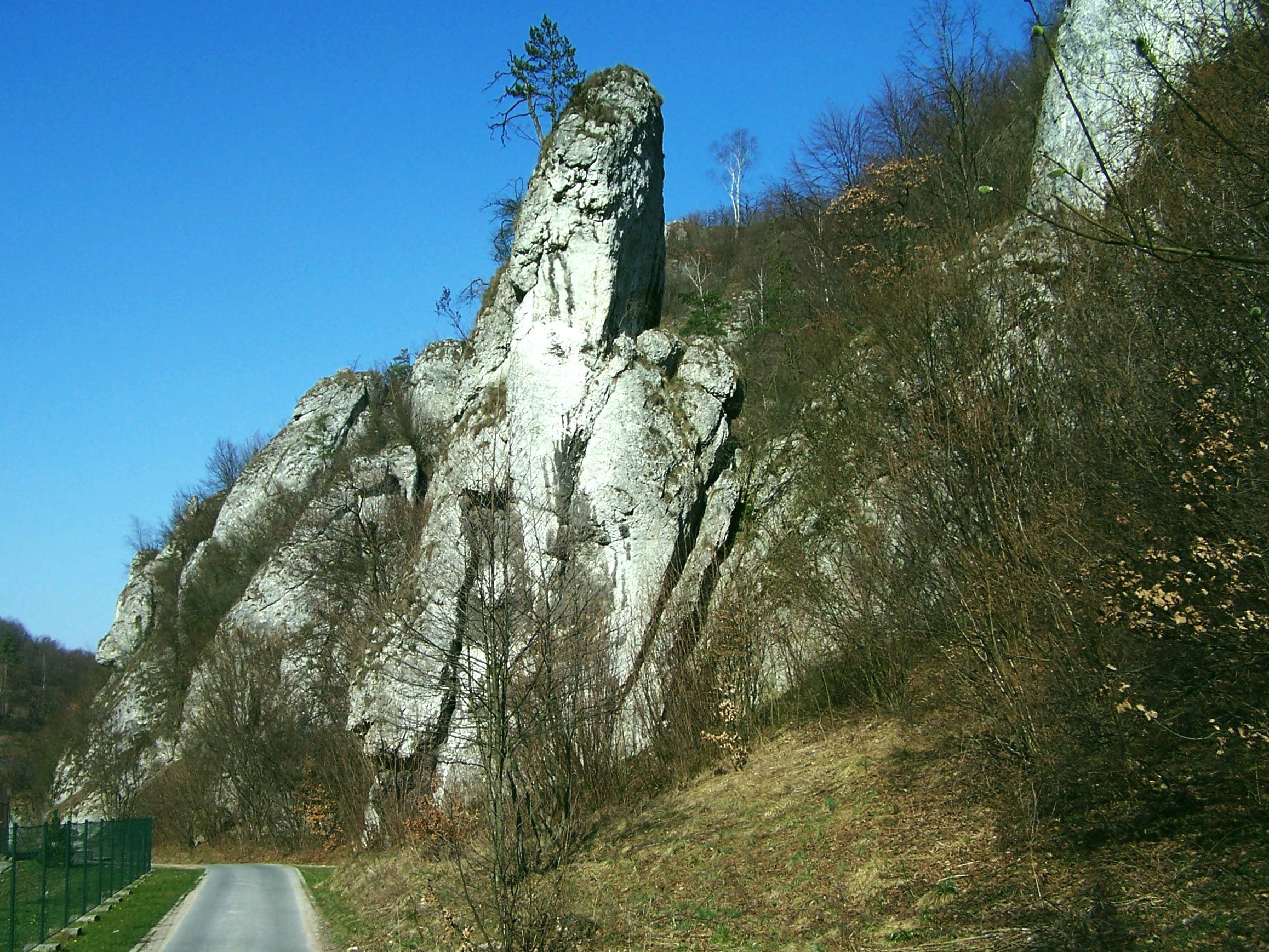 Rezerwat przyrody Zimny Dół